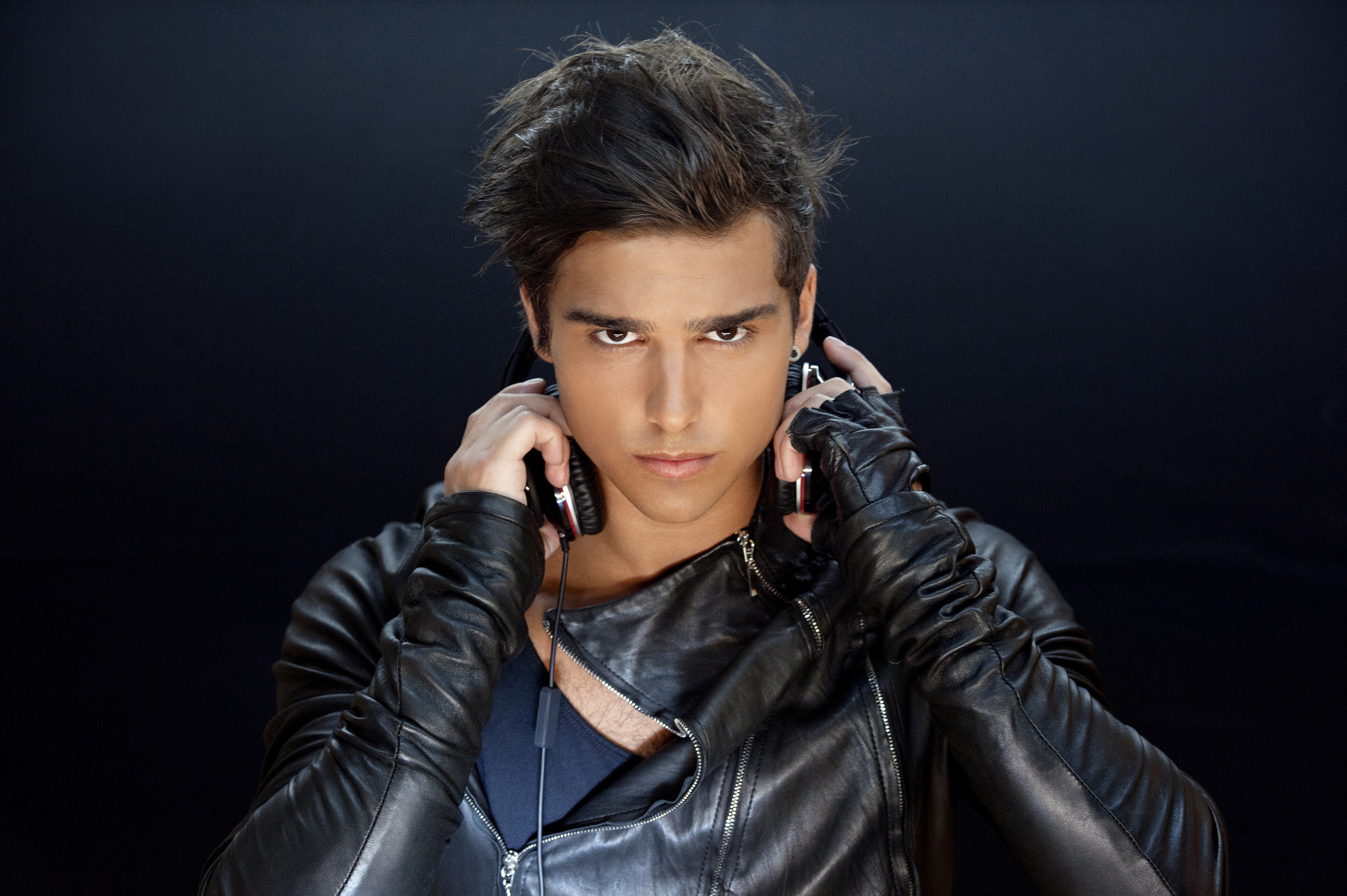 Artisten Eric Saade.